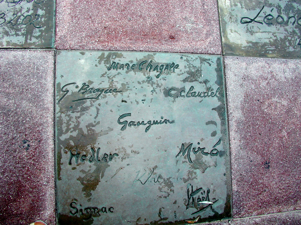 Eine Gehwegplatte aus dem Ruhmesweg